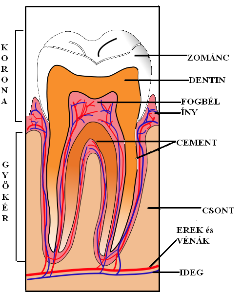 Az emberi fog felépítése